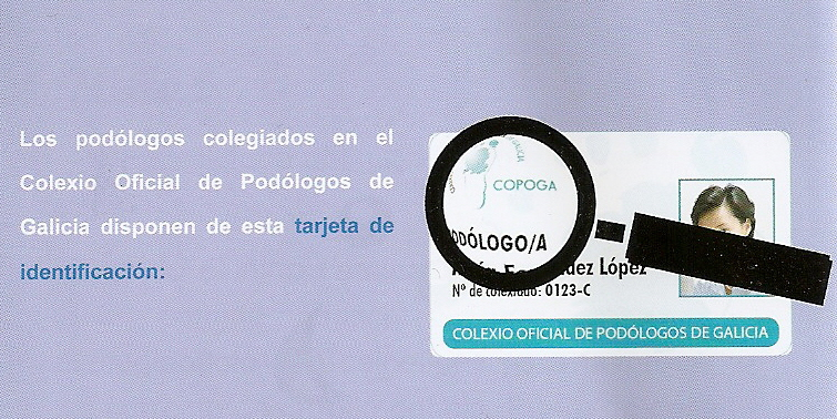 Calista